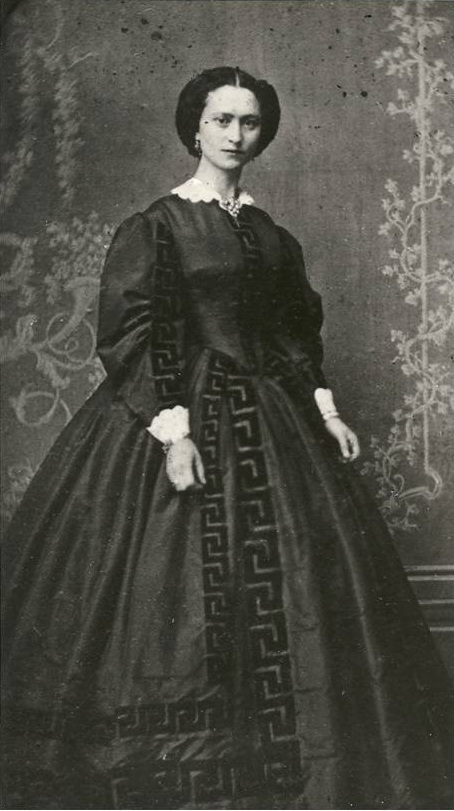 Portrettfoto, ca. 1860. Teaterarkivet, Universitetet i Bergen.